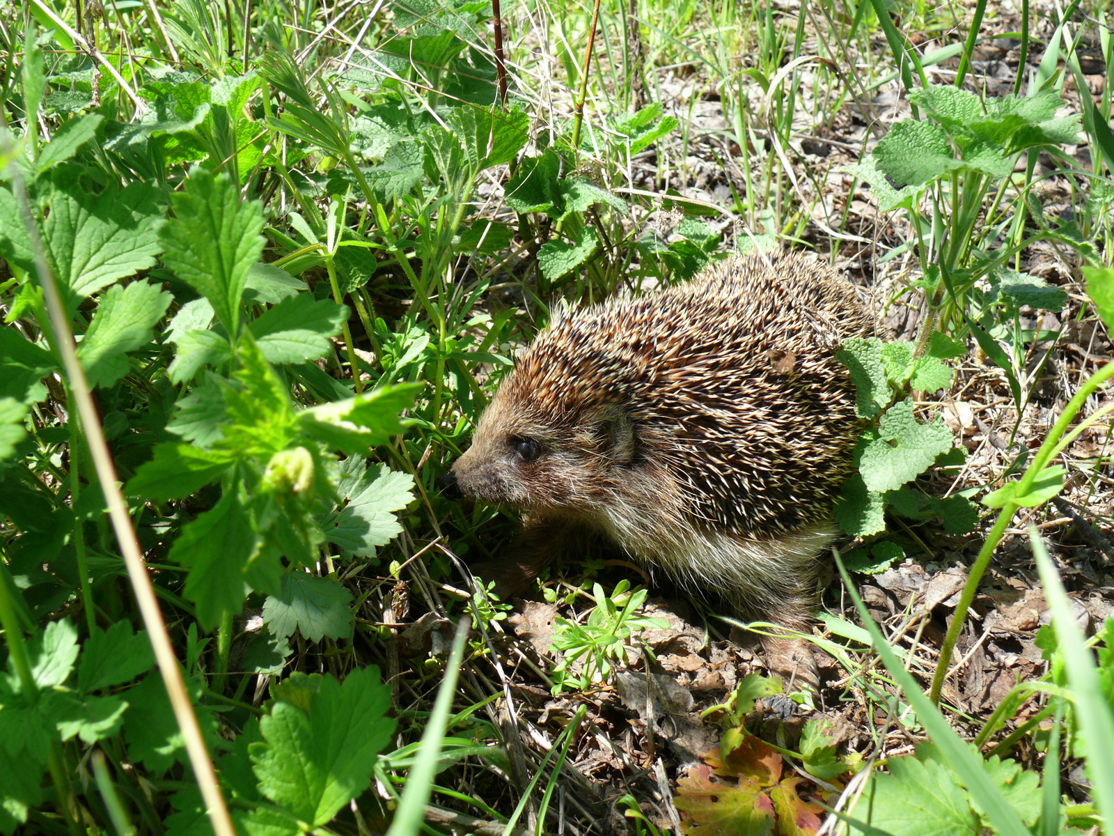 Лесной житель и частый гость приусадебных участков Валковщины.